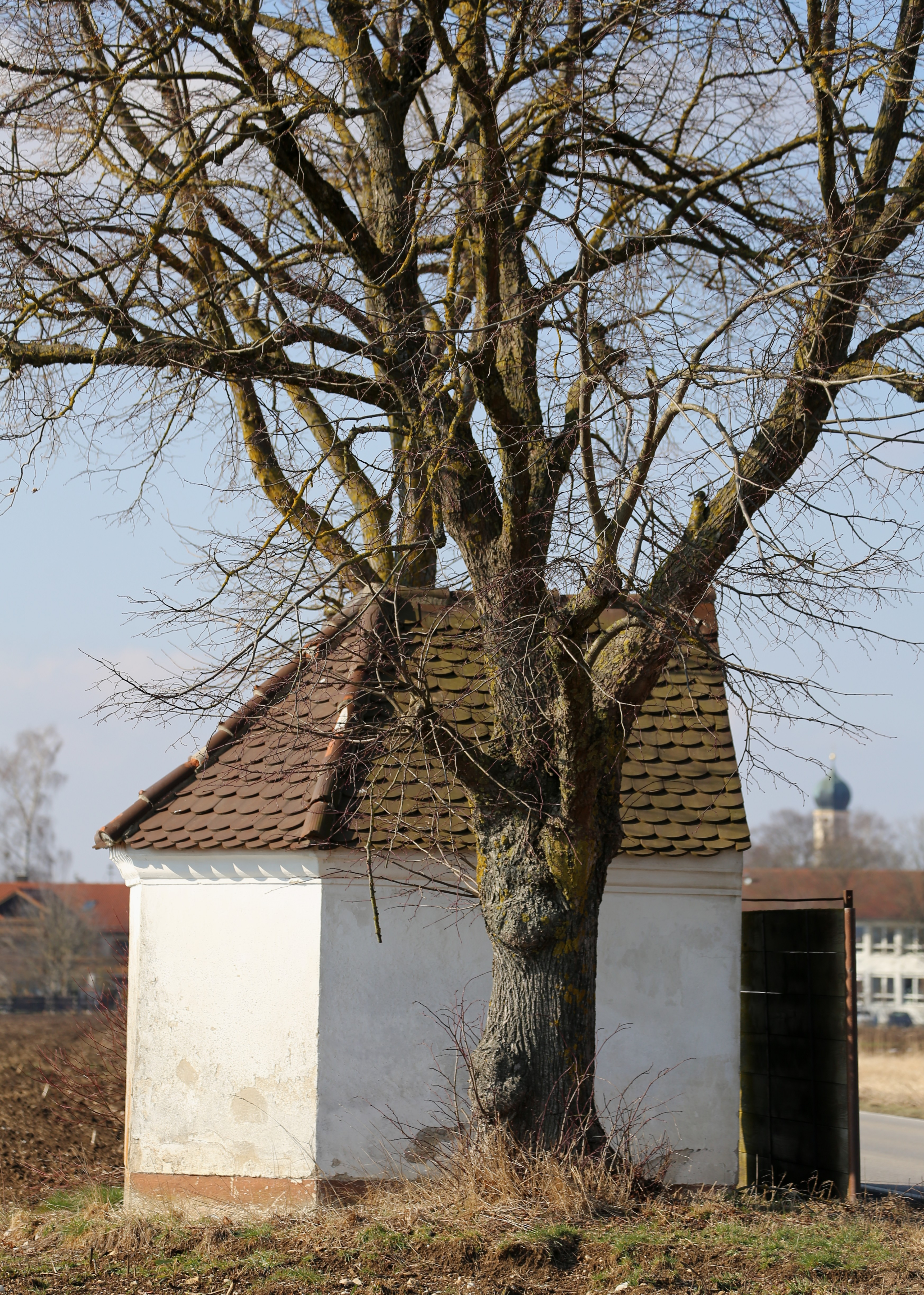 Siegertsbrunner Straße, Hohenbrunn; Gedenkkapelle, schlichte breite Nischenkapelle mit profiliertem Traufband, um 1840